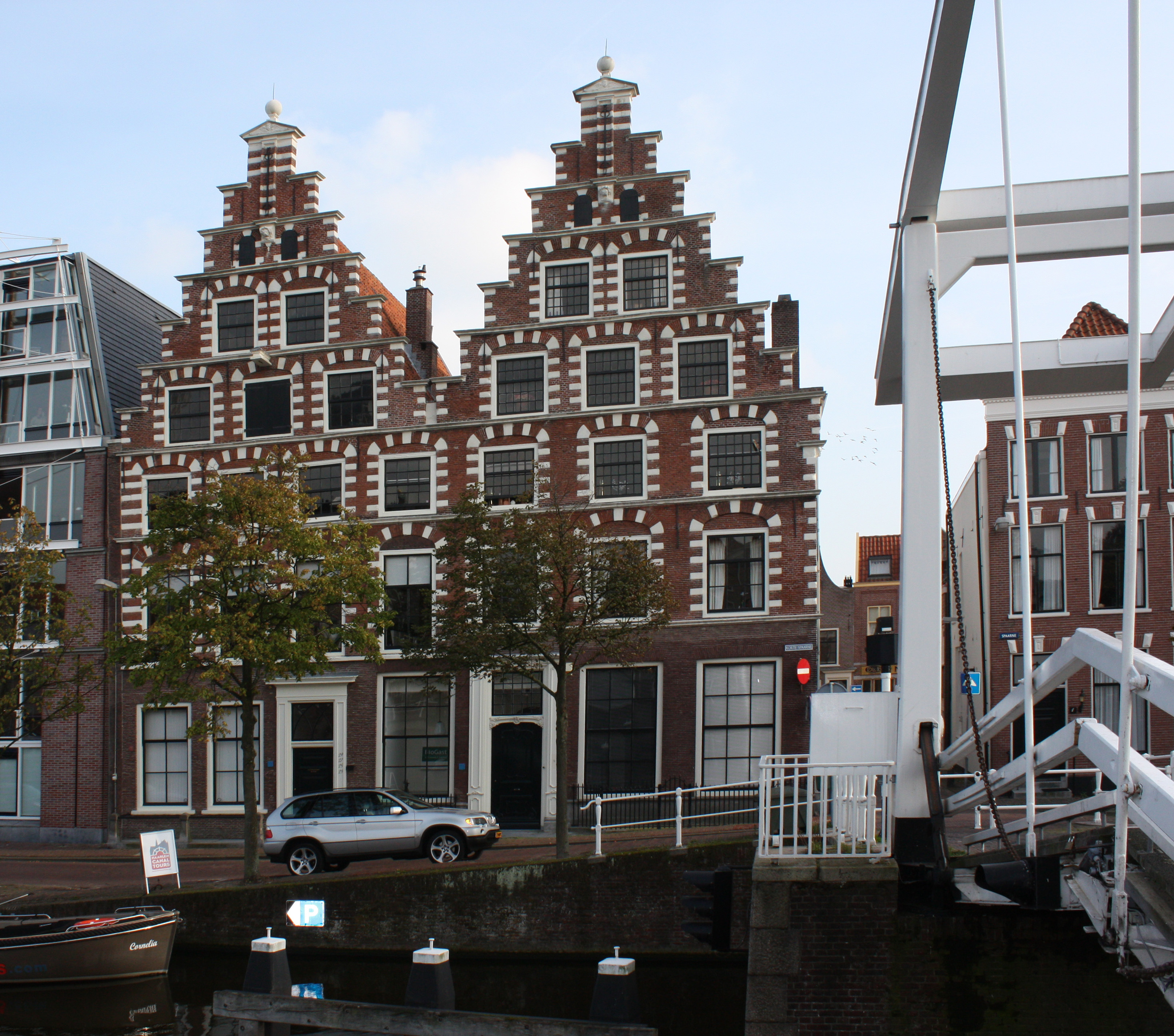 Twee trapgevels van het Haarlems type aan het Korte Spaarne te Haarlem